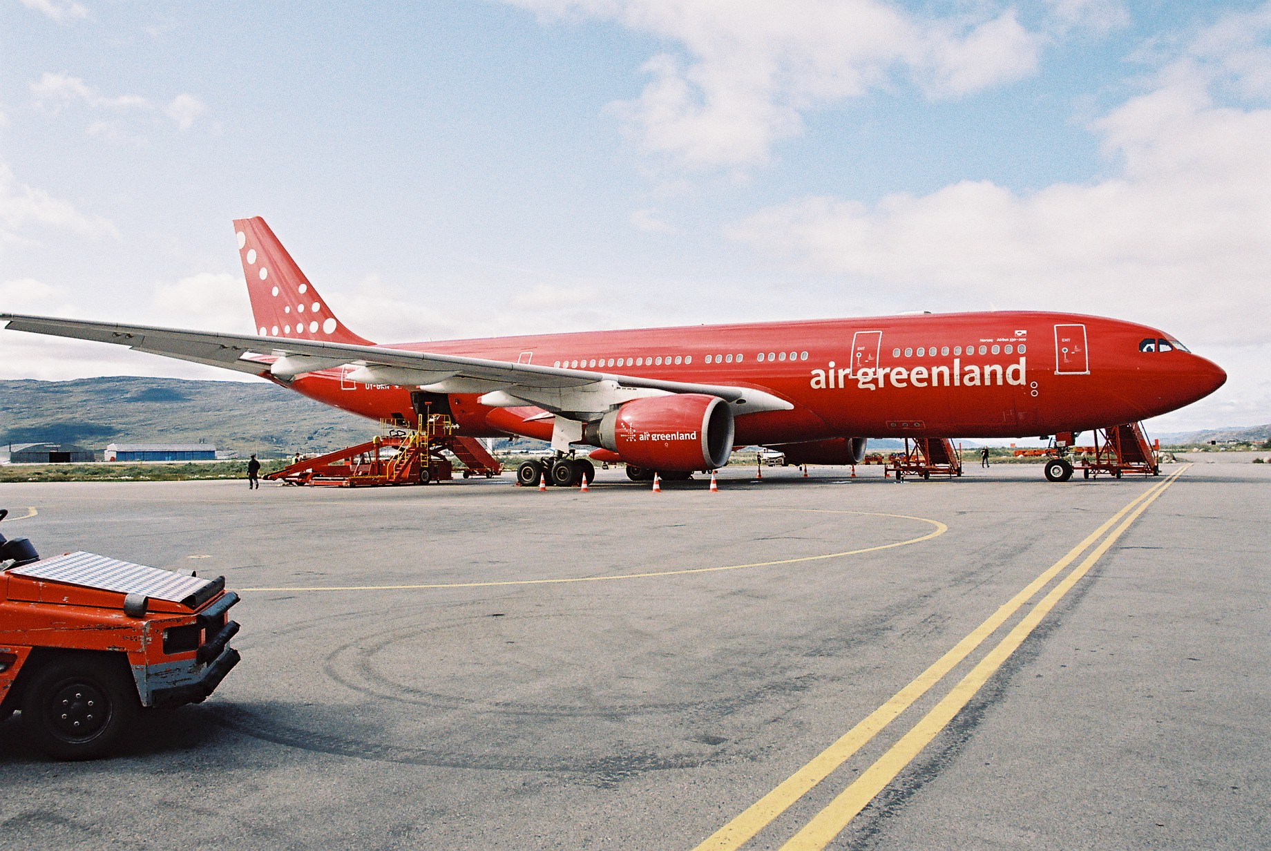 Air Greenland Airbus A330 at Kangerlussuag